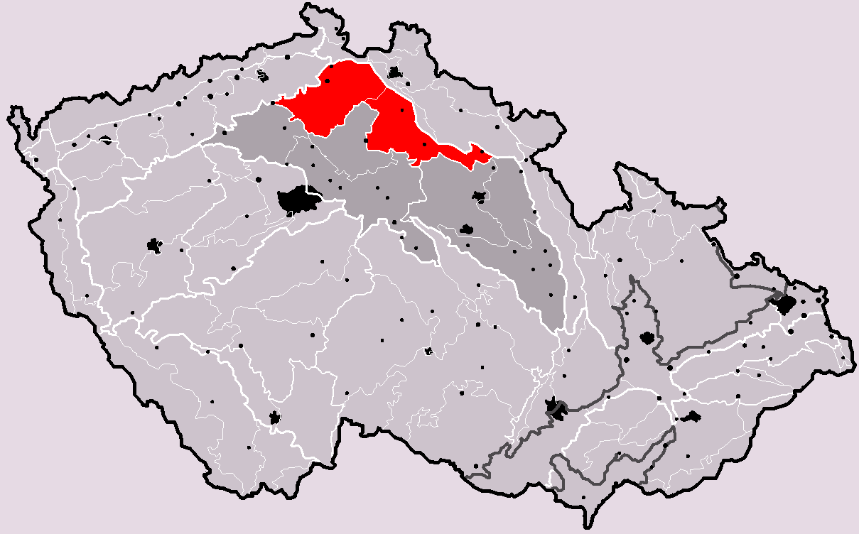 Poloha geomorfologické oblasti Severočeská tabule v rámci České republiky. Hercynský systém Hercynská pohoří I Česká vysočina I6 (VI) Česká tabule I6A (VIA) Severočeská tabule